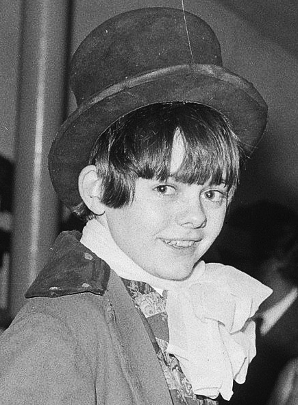 Collectie / Archief : Fotocollectie Anefo Reportage / Serie : [ onbekend ] Beschrijving : Serie. Jack Wild (Dodger in film "Oliver") tijdens persconferentie in bioscoop Du Midi te Amsterdam Datum : 22 november 1968 Locatie : Amsterdam, Noord-Holland Trefwoorden : acteurs, bioscopen, films, persconferenties Persoonsnaam : Wild, Jack Instellingsnaam : Du Midi Fotograaf : Evers, Joost / Anefo Auteursrechthebbende : Nationaal Archief Materiaalsoort : Negatief (zwart/wit) Nummer archiefinventaris : bekijk toegang 2.24.01.03 Bestanddeelnummer : 921-8847